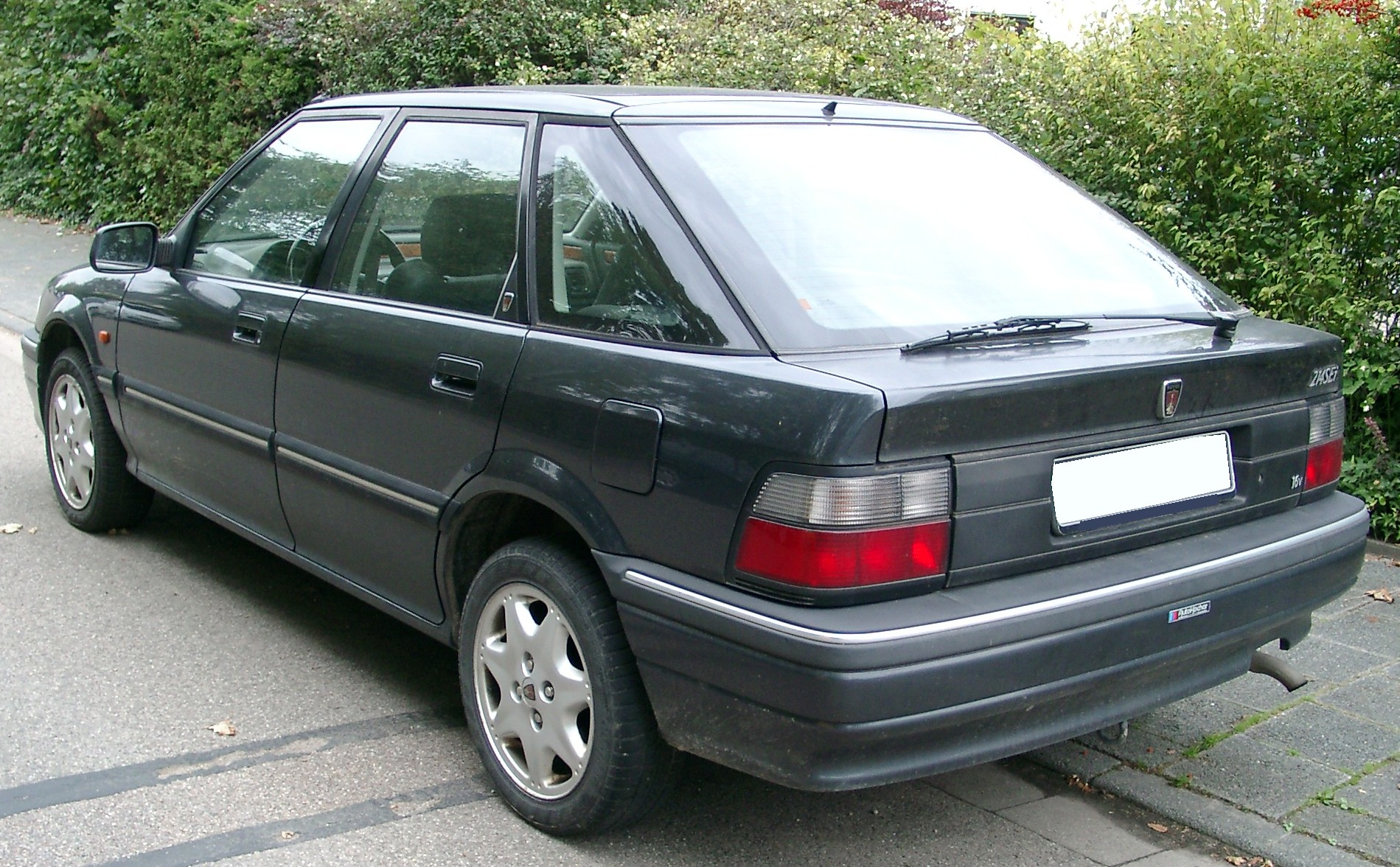 Rover 214